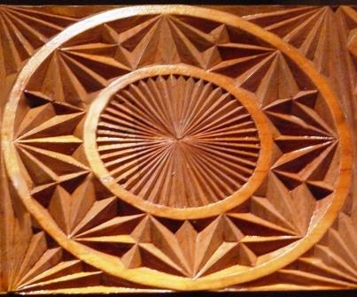 Резьба по дереву. Традиционный потолок хижины на Памире Таджикистан Тоҷикӣ: Кадакорӣ дар чӯб. Шифти манзил дар Помир (Тоҷикистон)